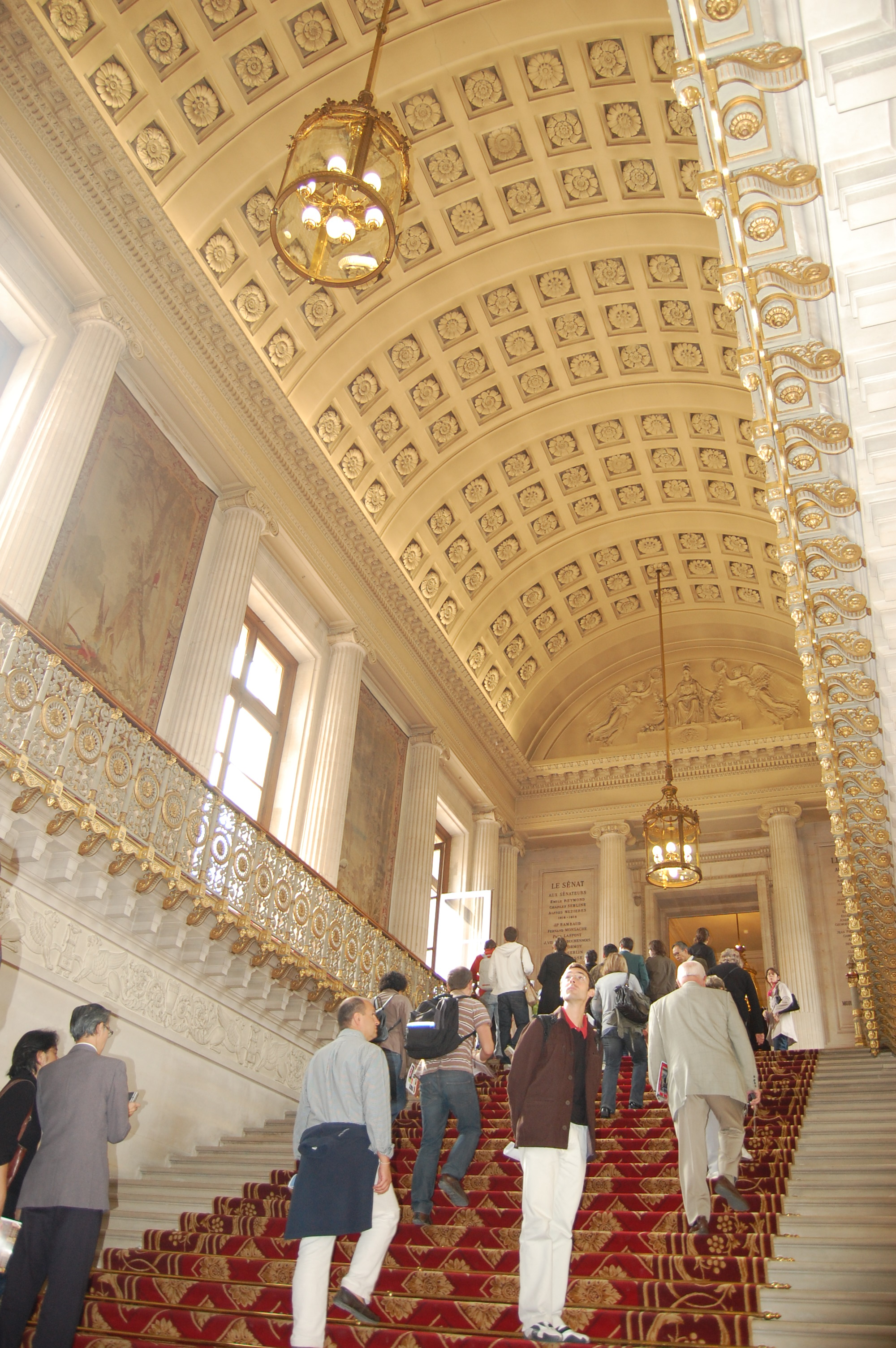 escalier d'honneurdu palais du luxembourg